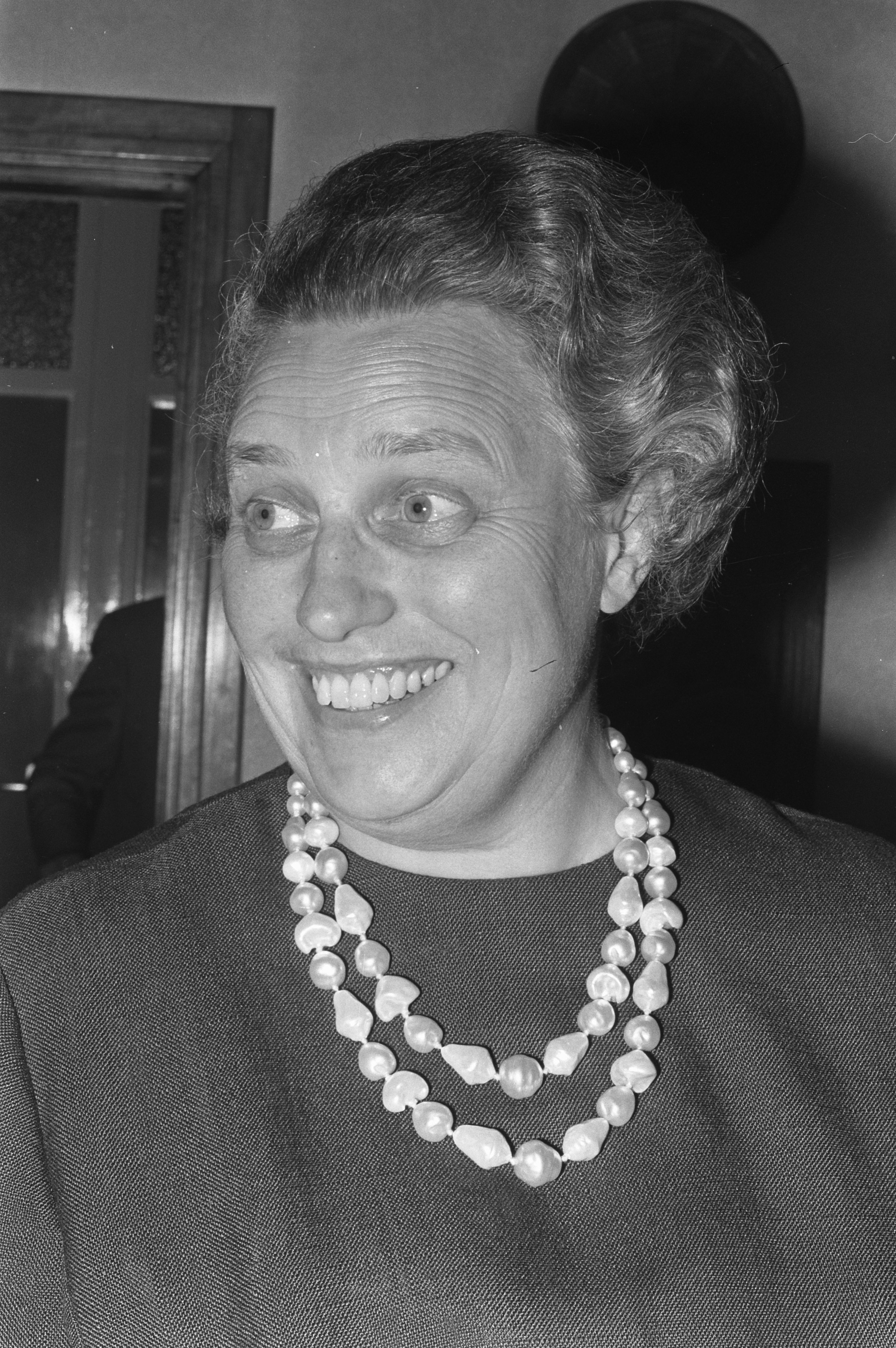 Collectie / Archief : Fotocollectie Anefo Reportage / Serie : [ onbekend ] Beschrijving : Afscheidsreceptie commissaris van politie mr. Van Haaren commandant mejuffrouw mr. T. de Jong Datum : 26 juli 1972 Trefwoorden : POLITIE, afscheidsrecepties, commandanten, commissarissen Fotograaf : Croes, Rob C. / Anefo Auteursrechthebbende : Nationaal Archief Materiaalsoort : Negatief (zwart/wit) Nummer archiefinventaris : bekijk toegang 2.24.01.05 Bestanddeelnummer : 925-7679